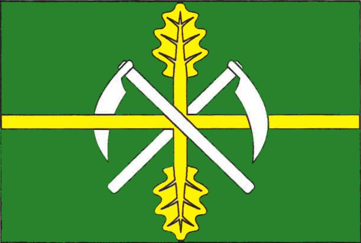 Seletice vlajka